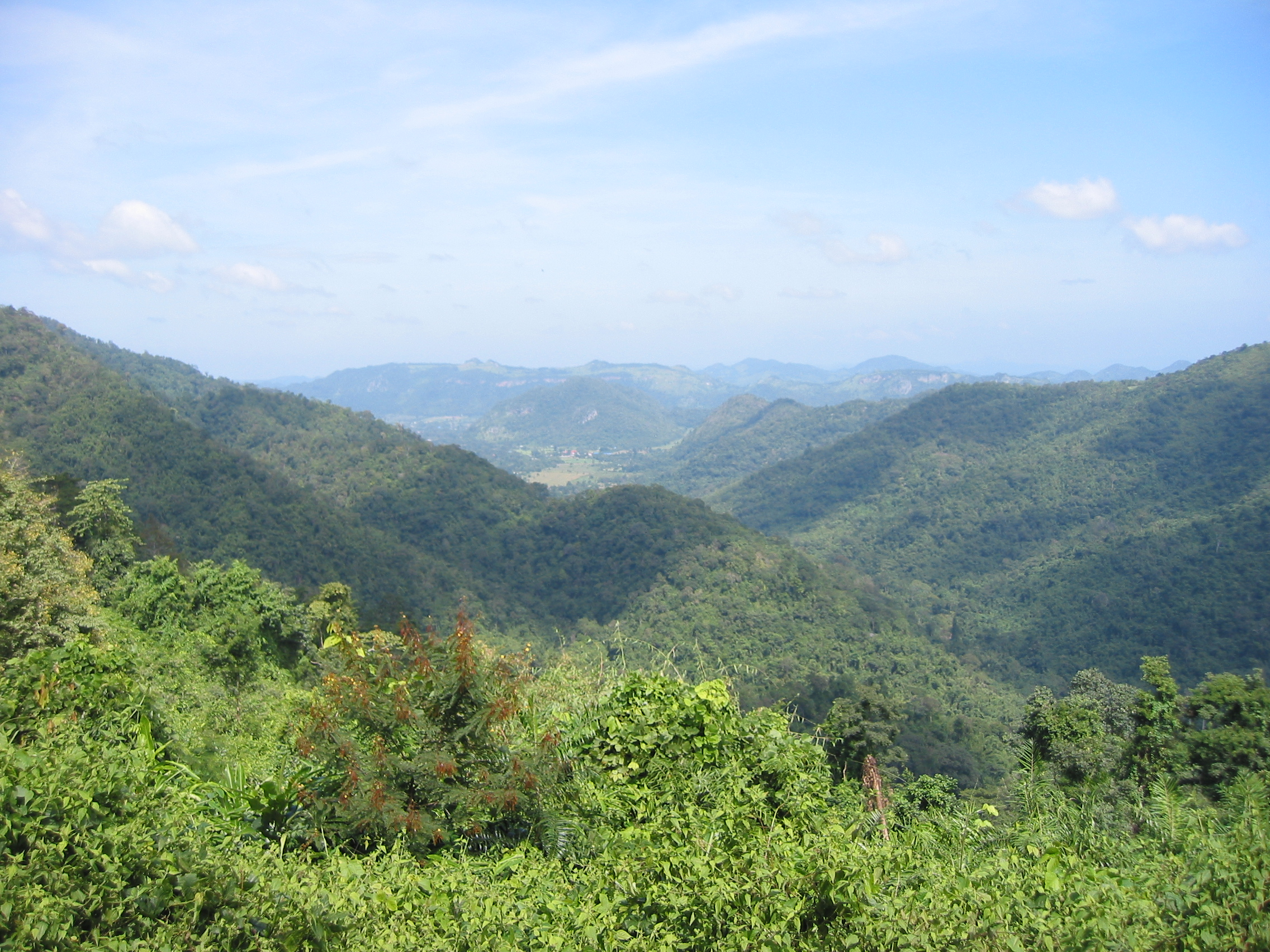 Khao Yai NP uitzicht. foto door Jacco van Trigt